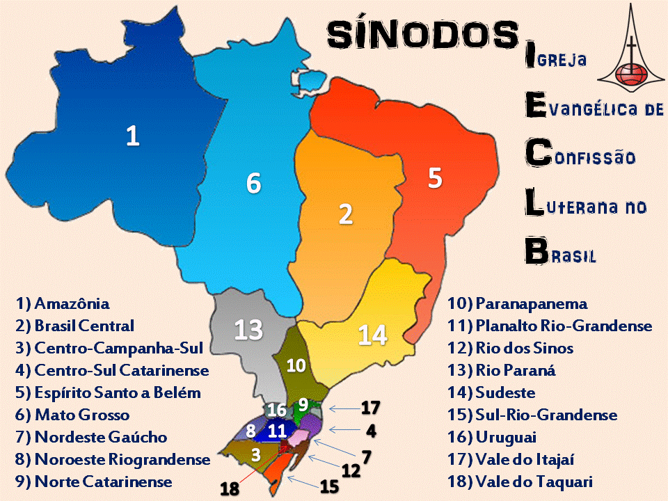 Divisão da IECLB em Sínodos